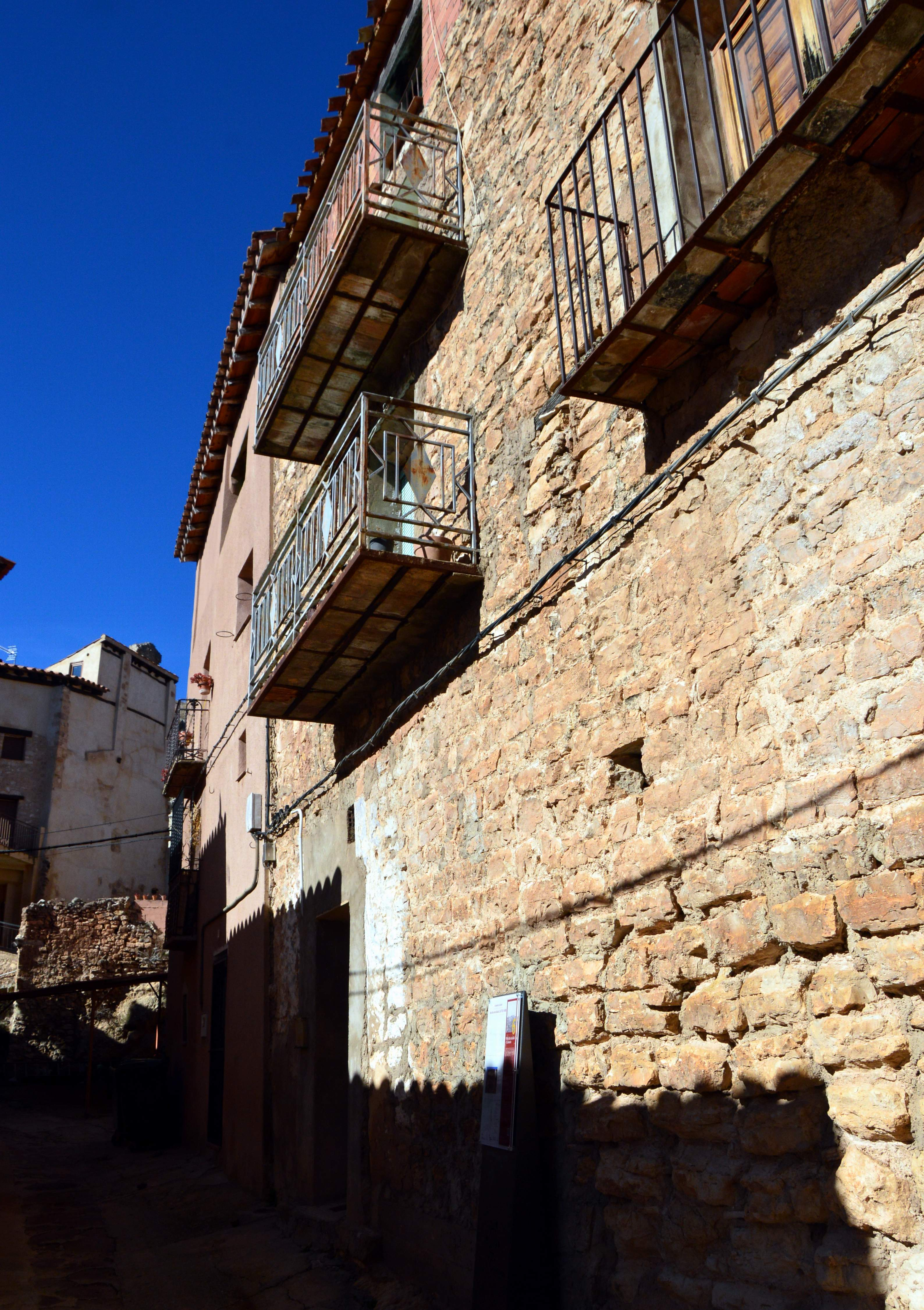 Detalle de muro en Castielfabib (Valencia), correspondiente al paño de muralla de la calle Calvario (2019).